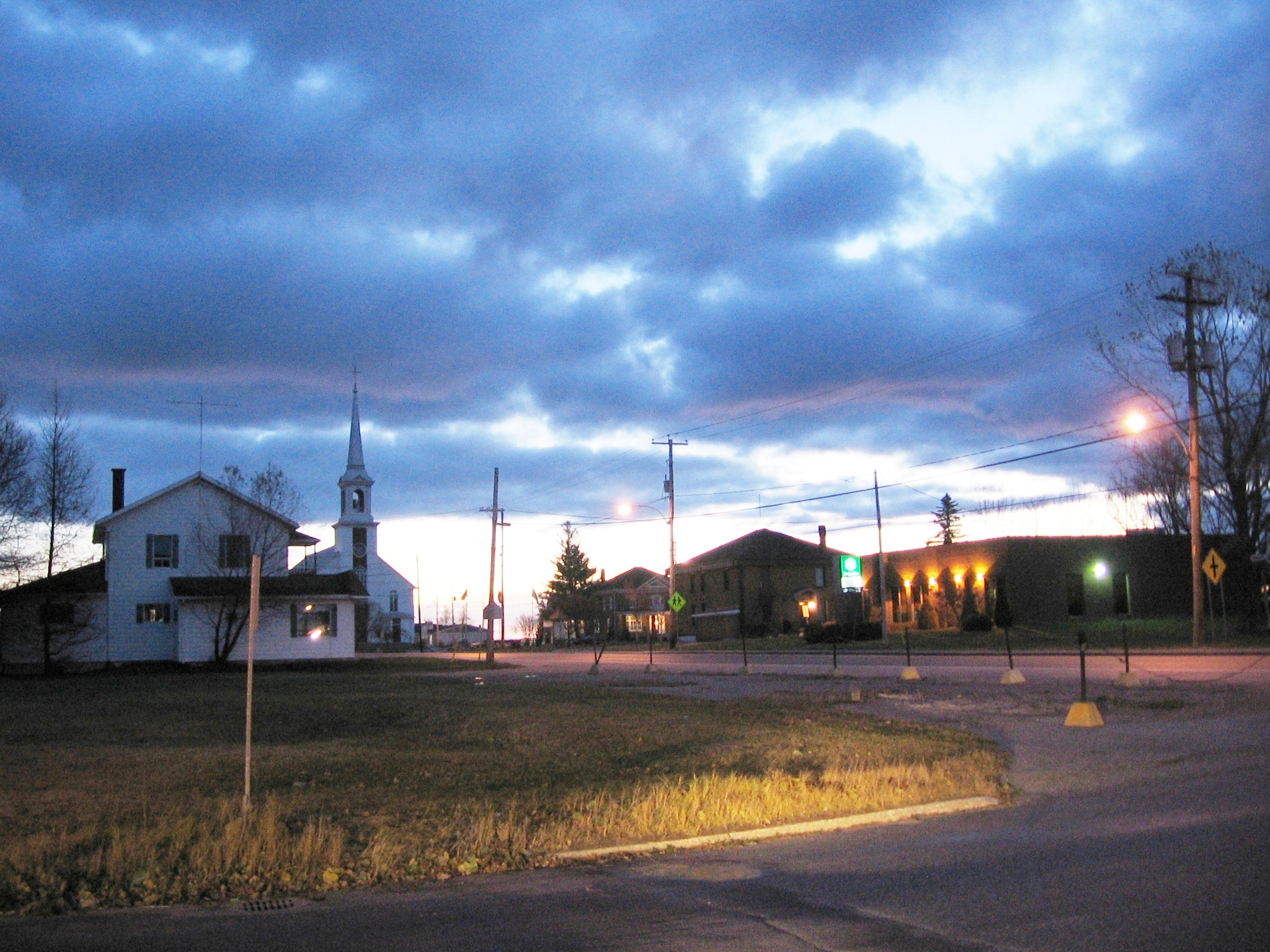 vue Albanel